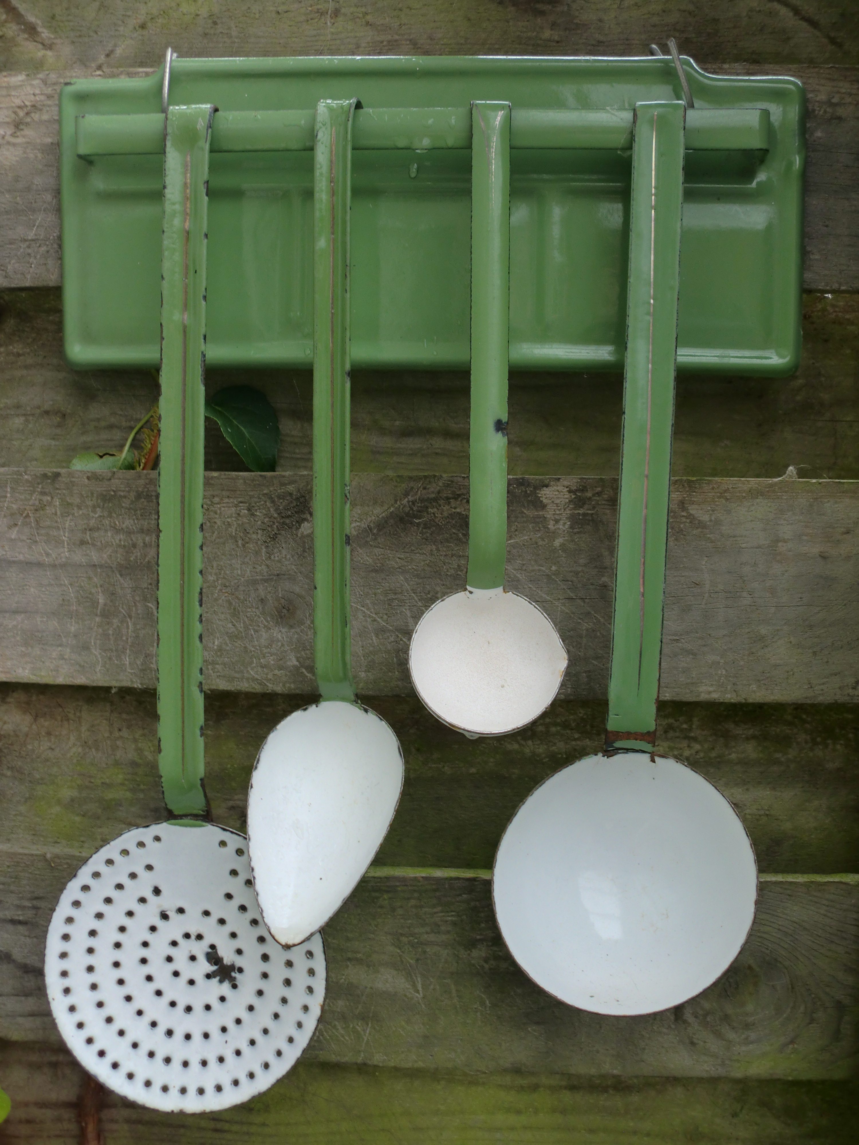 Emaille lepelrek